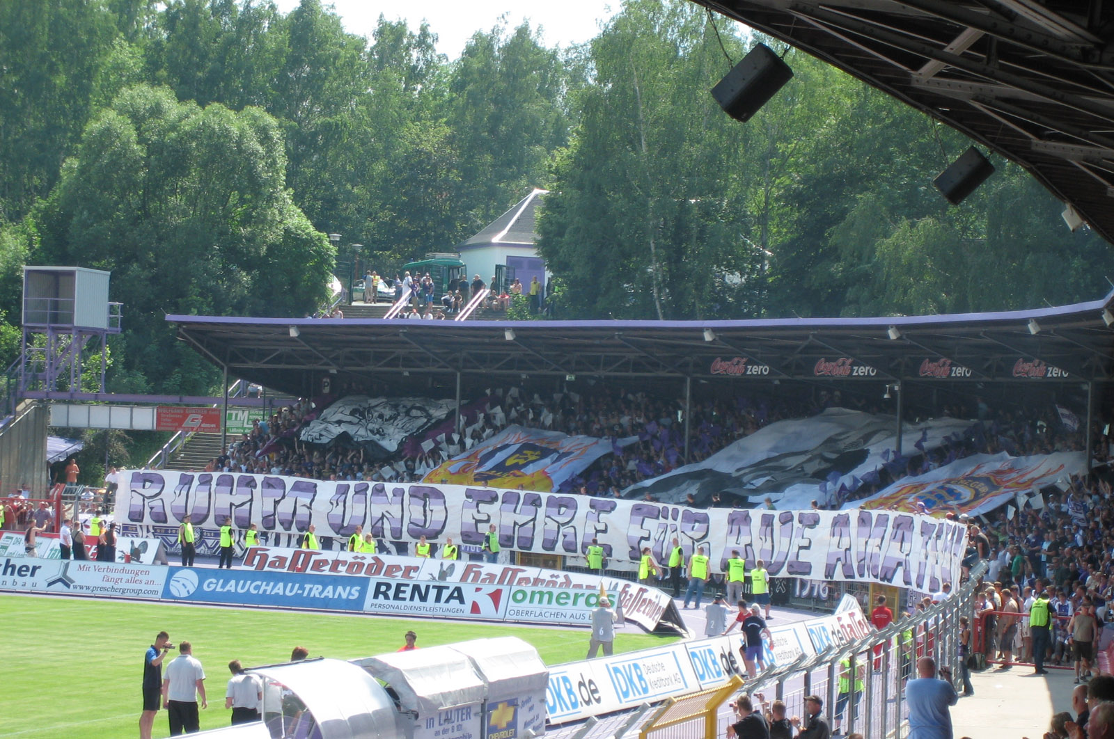 Choreografie beim Sachsen-Pokalfinale zwischen FC Erzgebirge Aue II und Dynamo Dresden im Erzgebirgsstadion in Aue (Sachsen).